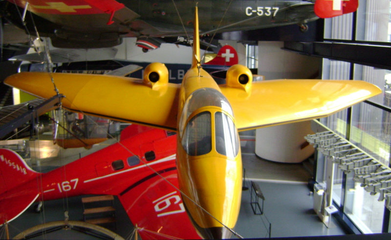 N-20 Front